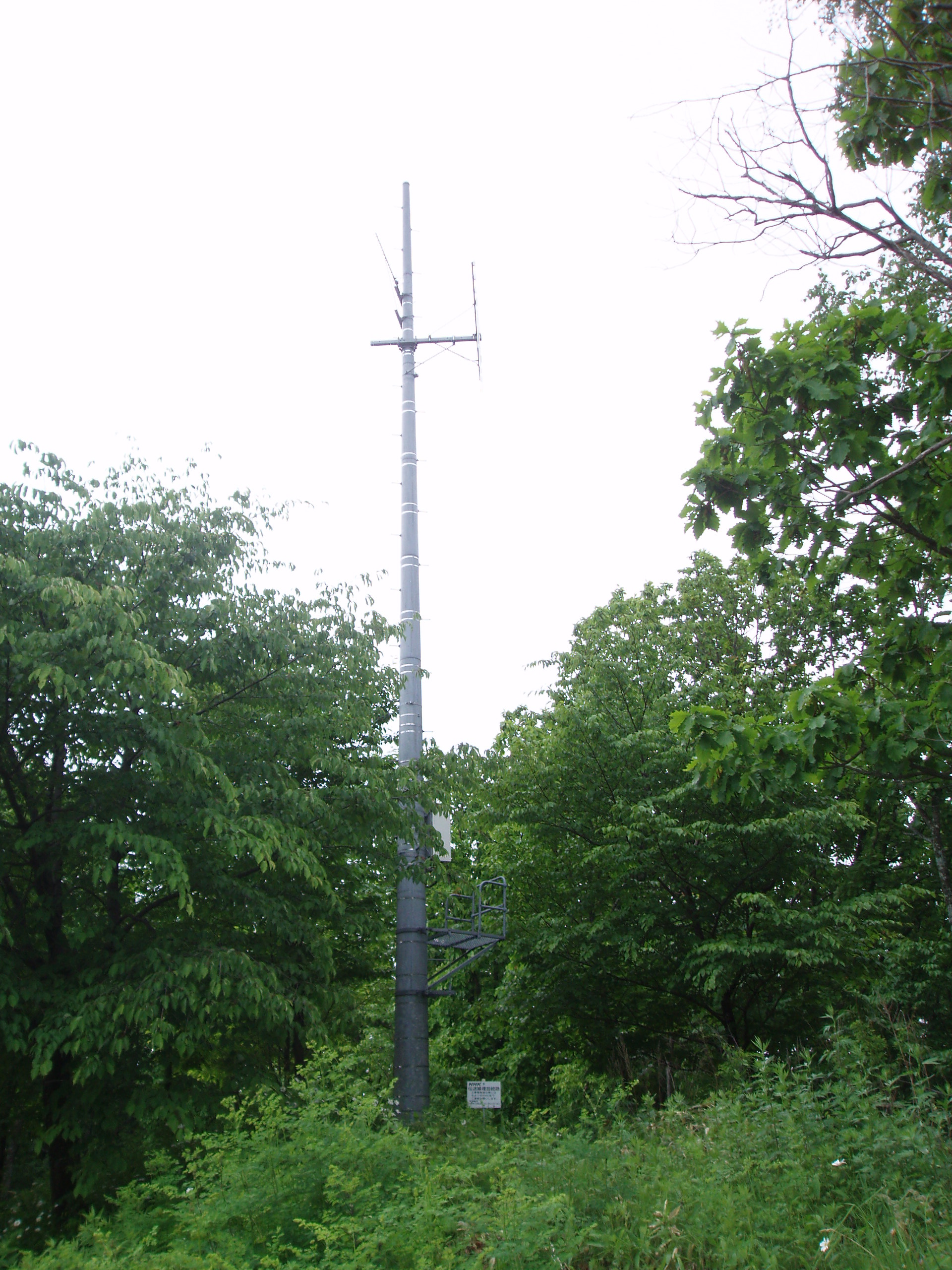 北見若葉（西北見）中継局（NHK・HBC・STV・HTB・UHB）